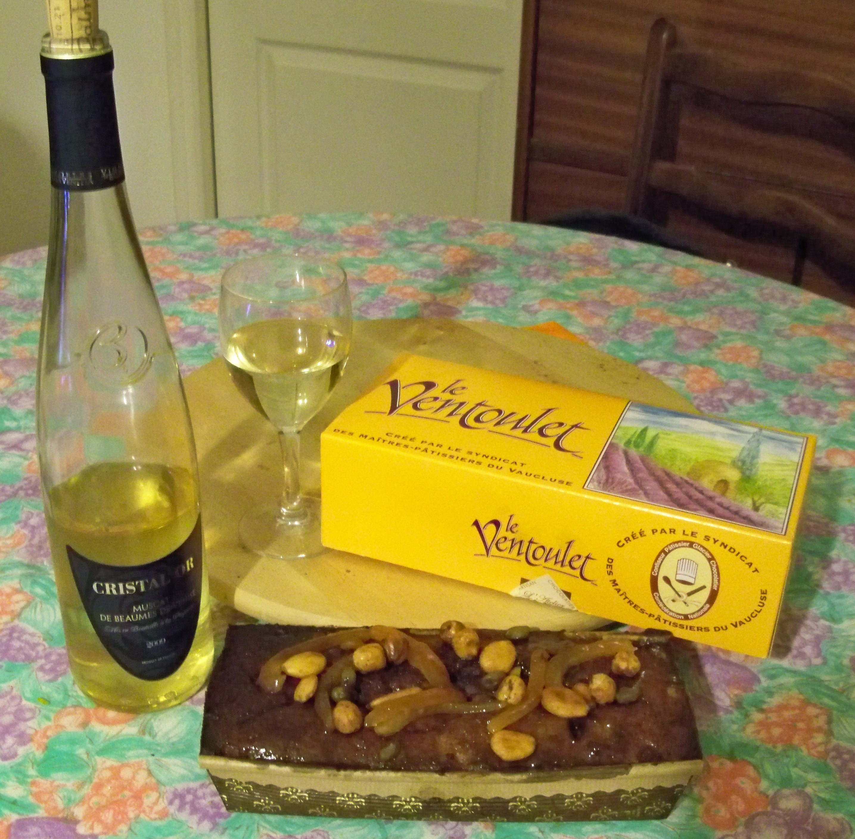 Ventoulet, création des patissiers du Vaucluse (84)